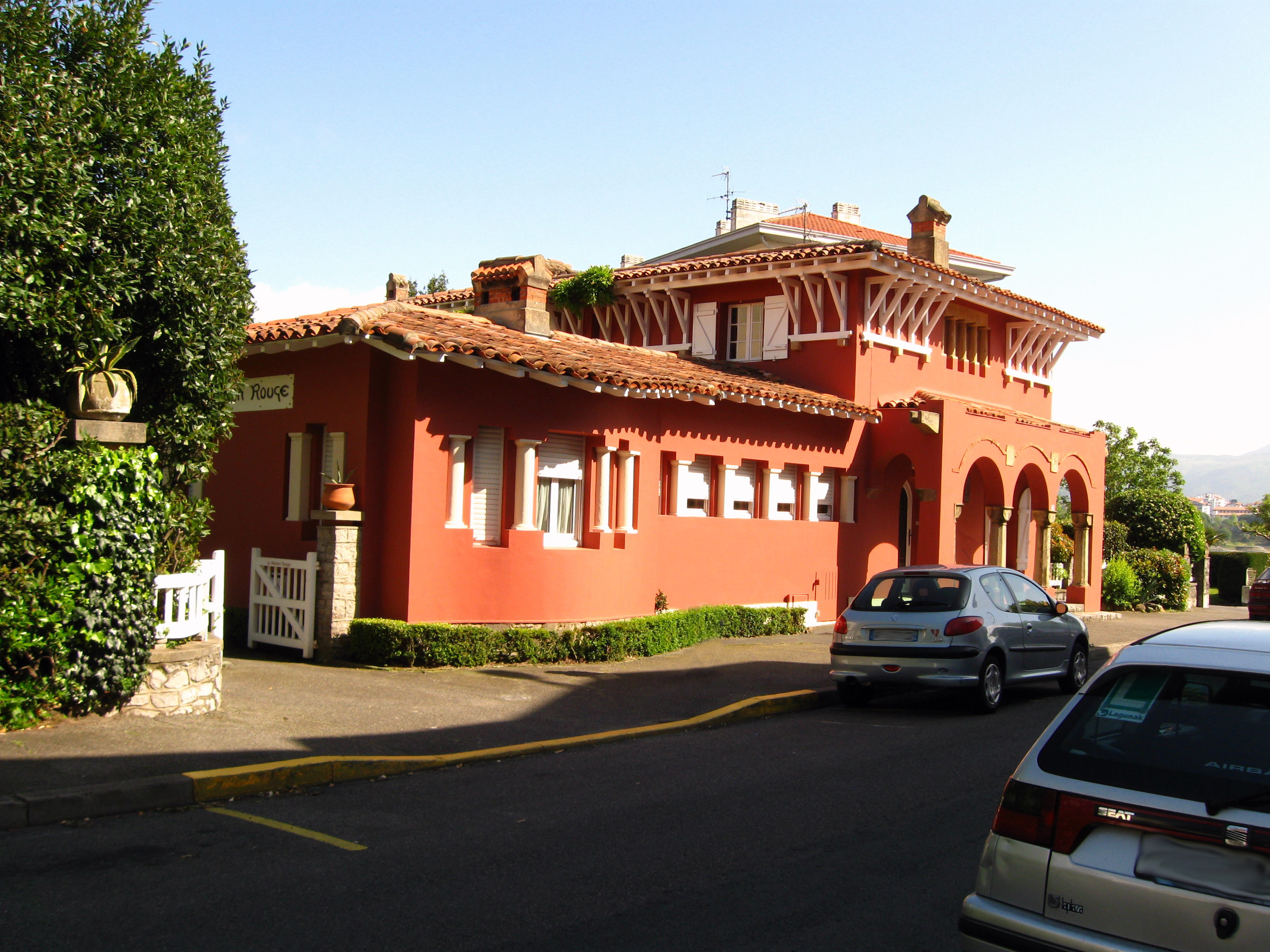 La villa Maison Rouge (architecte : Edmond Durandeau), rue des Citronniers à Hendaye, est inscrite aux monuments historiques.